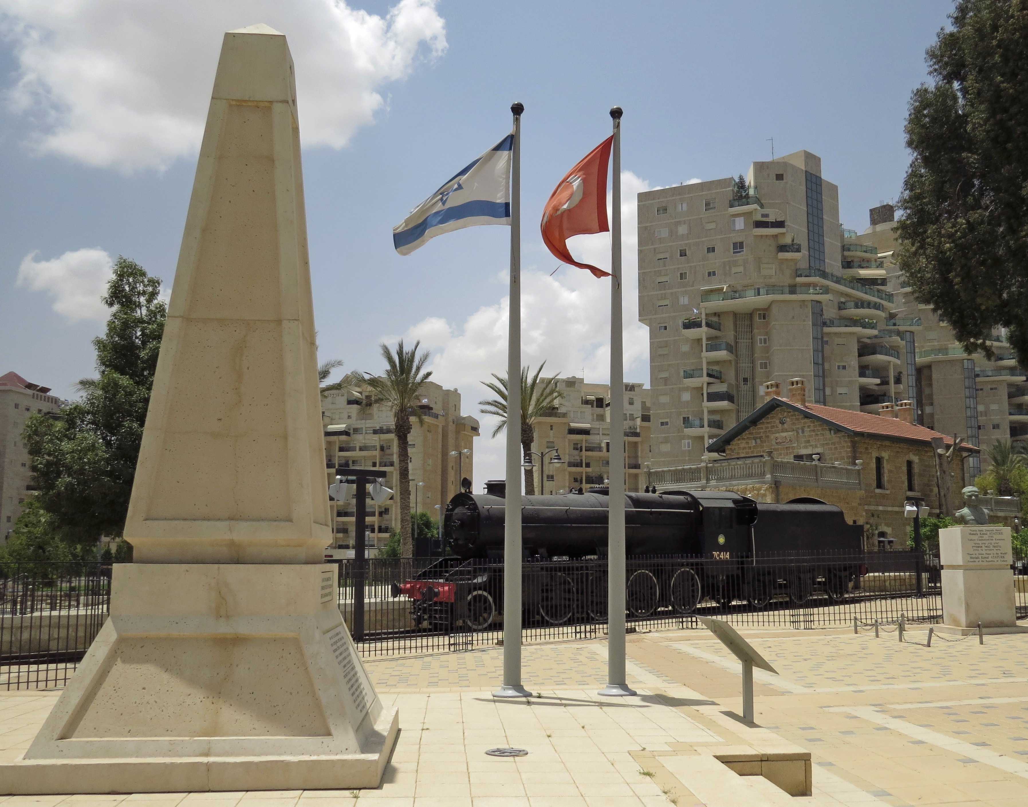 תחנת הרכבת הטורקית בבאר שבע היא תחנת רכבת היסטורית שהוקמה על ידי העות'מאנים ב-1915. שניים ממבני התחנה עדיין עומדים על תלם וניתן למצוא אותה ממערב לעיר העתיקה של באר שבע, באזור המכונה "רמב"ם".